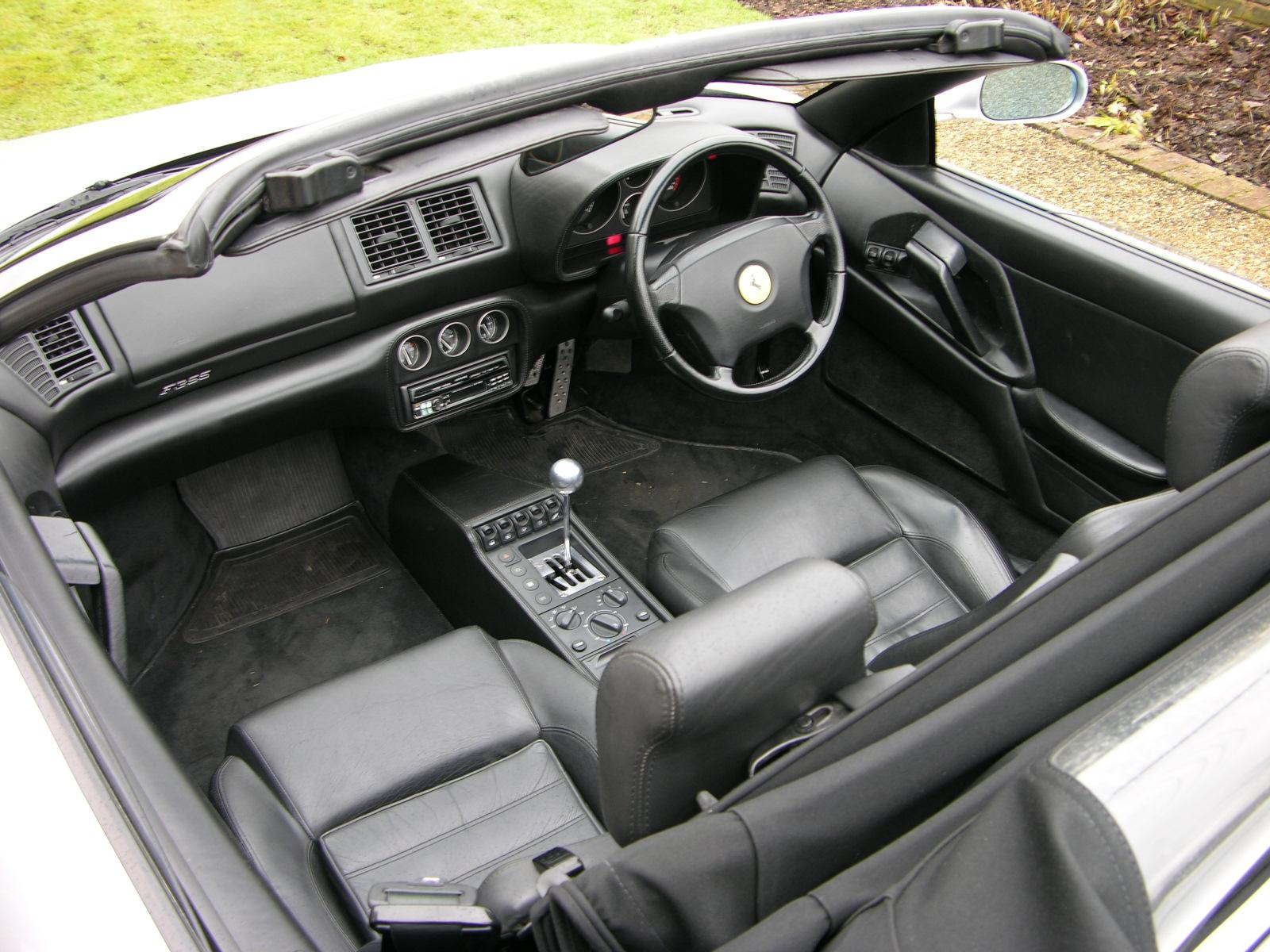 1997 Ferrari F355 Spider